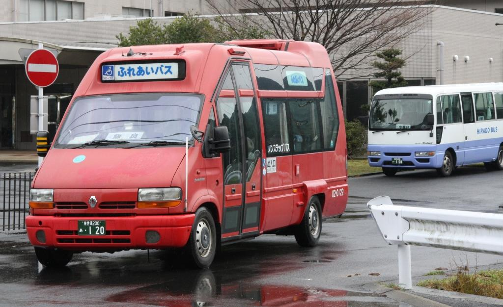 平戸ふれあいバスに使用されているマルチノーバ・オムニライダー